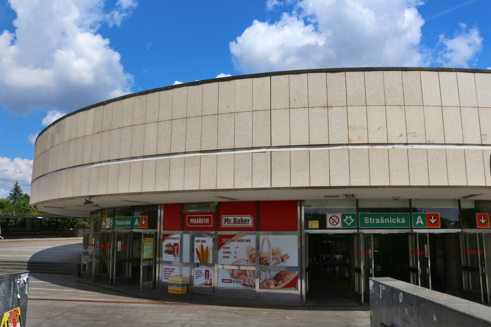 Metro Strašnická